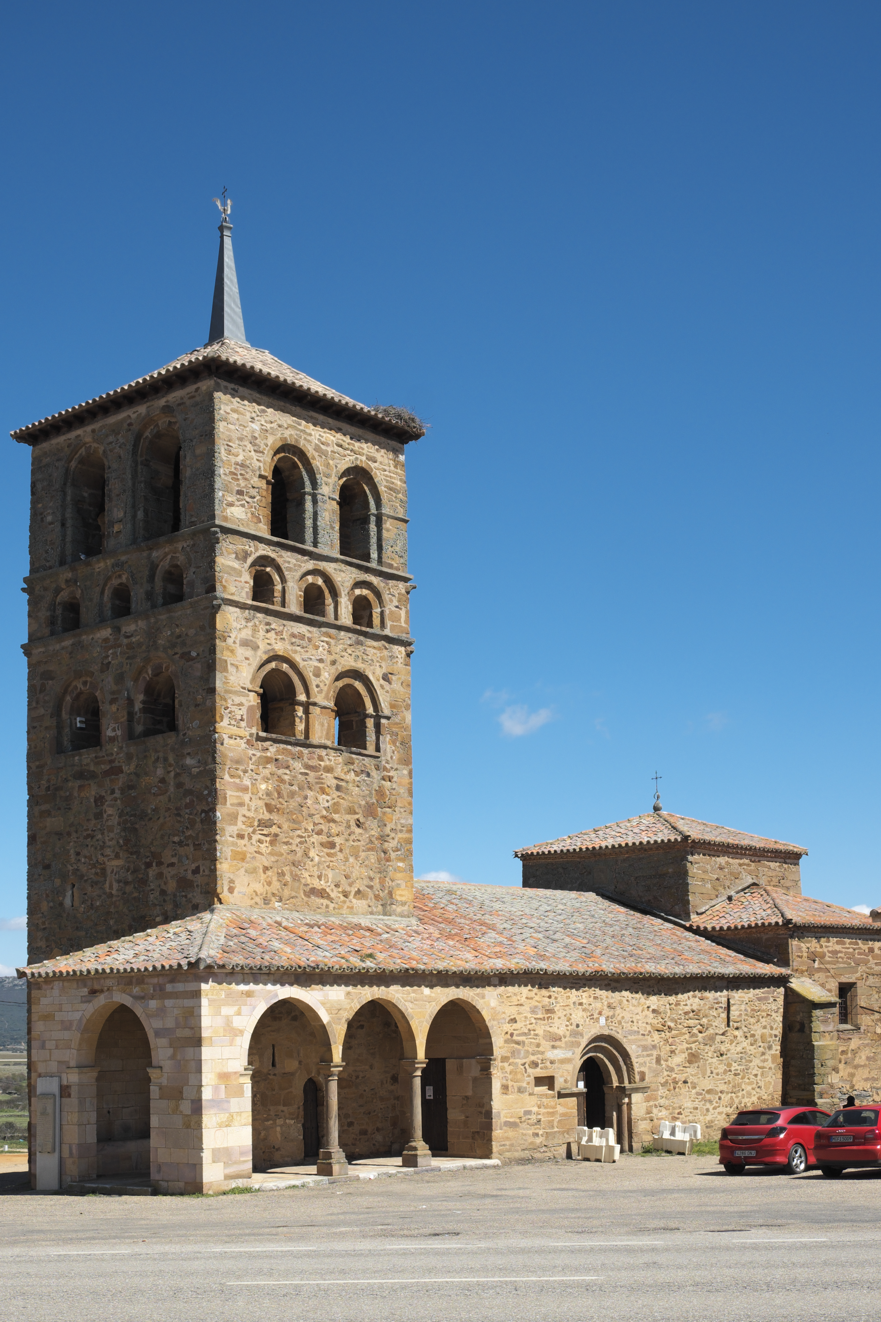 Katholische Pfarrkirche Santa María in Tábara in der Provinz Zamora in Kastilien und León (Spanien)